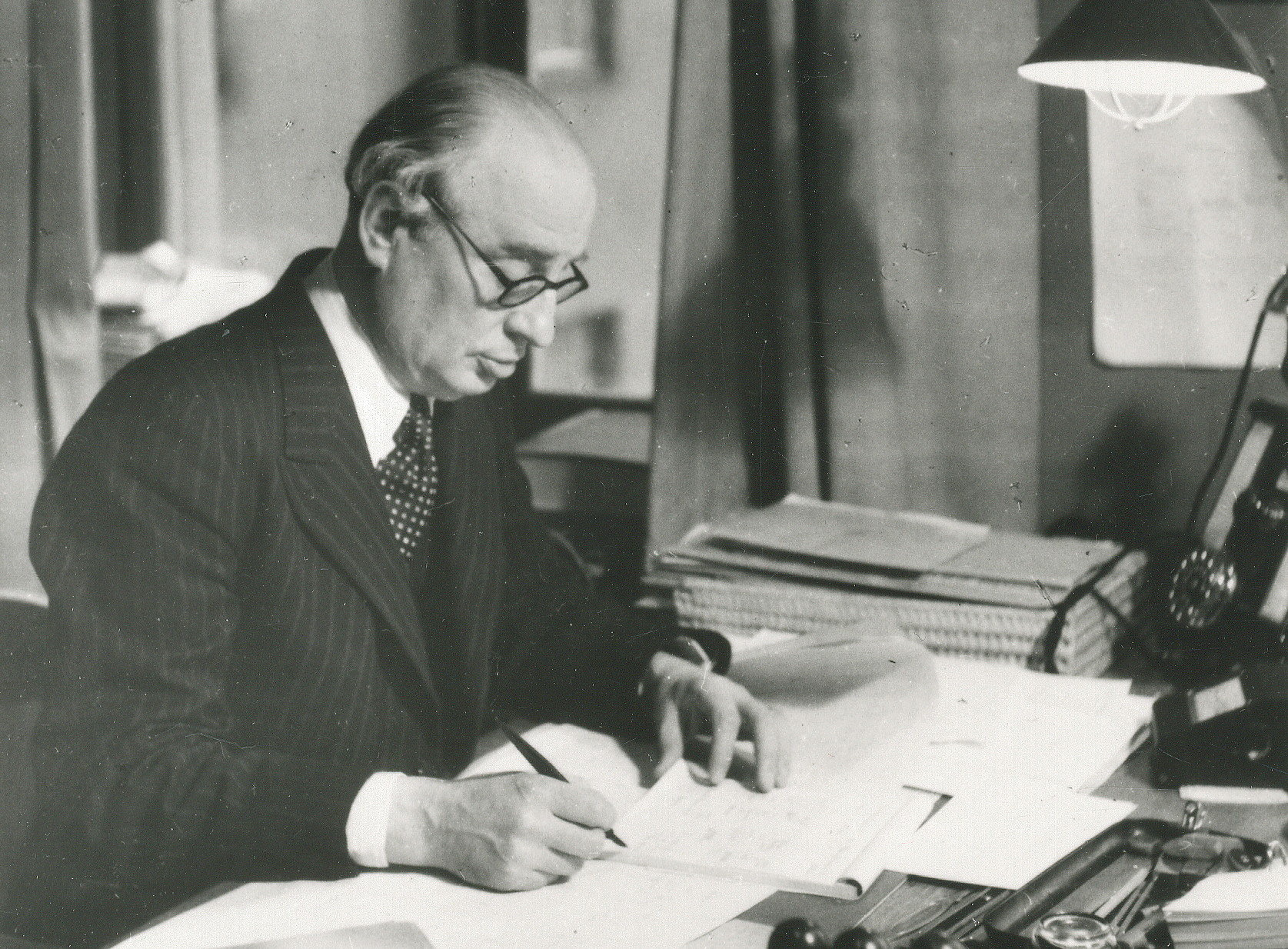 Fritz H. Eriksson, direktör på Olsson & Rosenlund